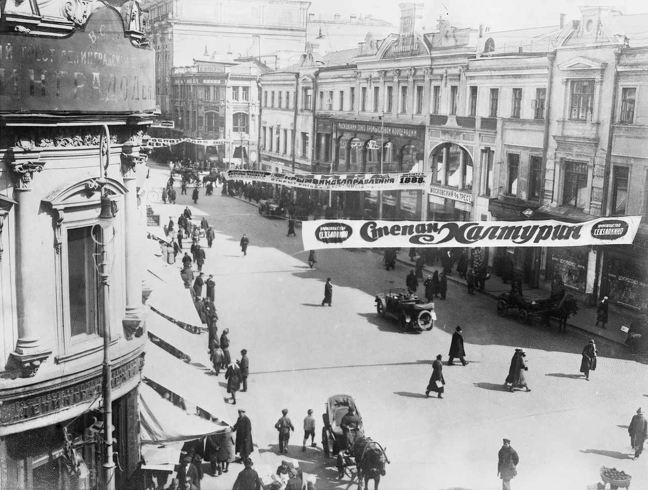 Кузнецкий мост и Петровка.